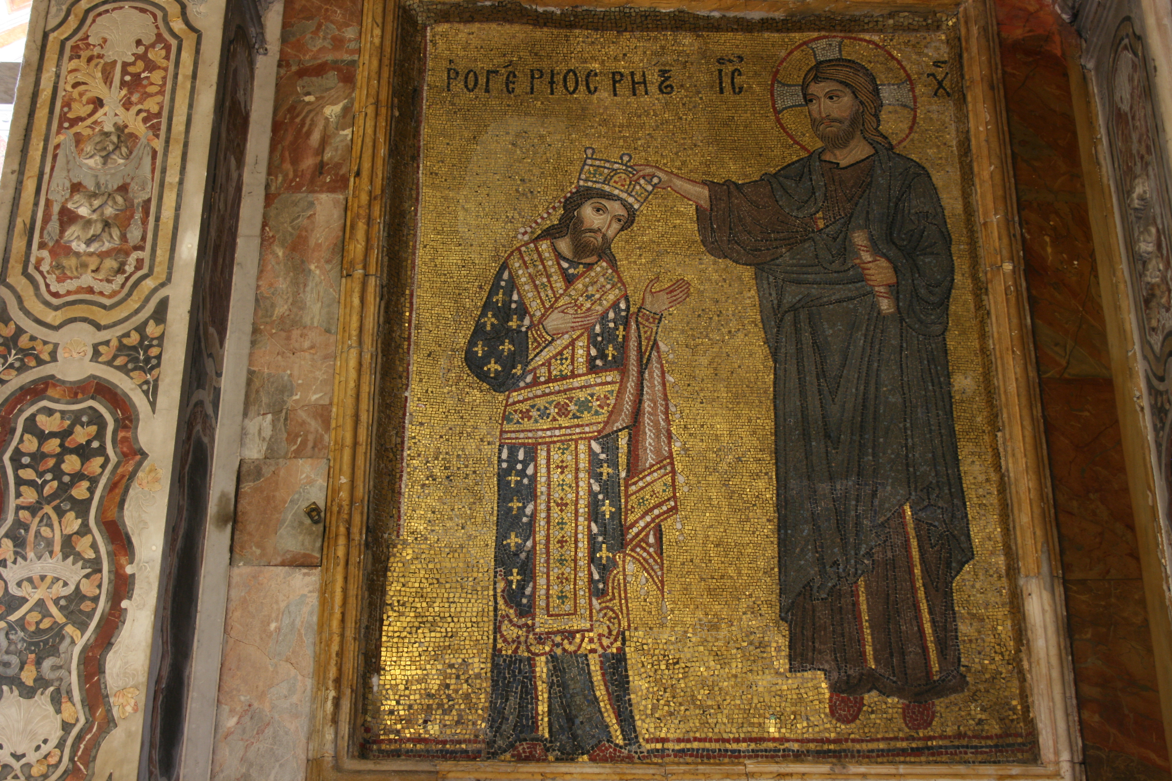 Chiesa della Martorana Christus krönt Roger II.